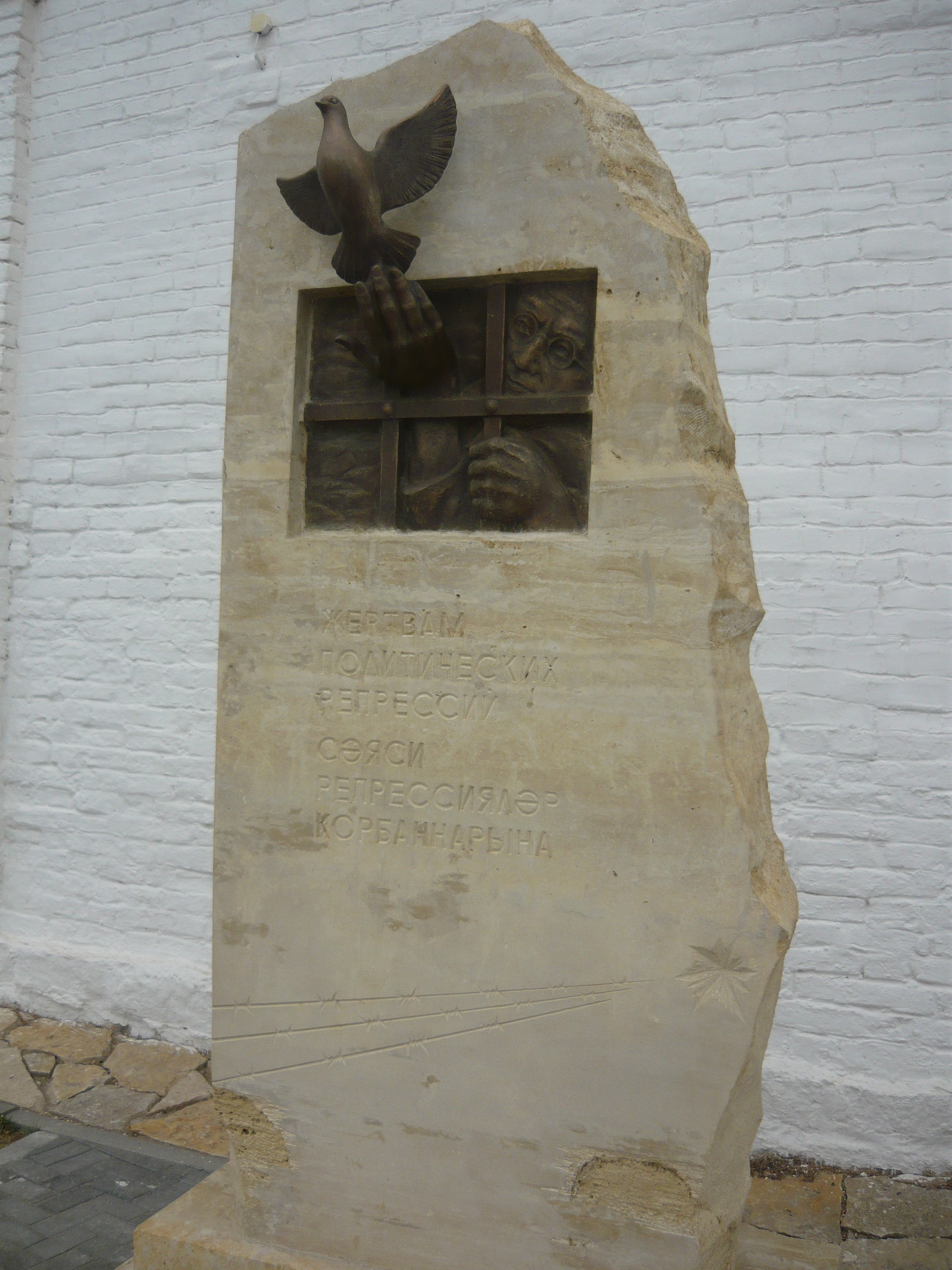 памятник жертвам политических репрессий в Свияжске